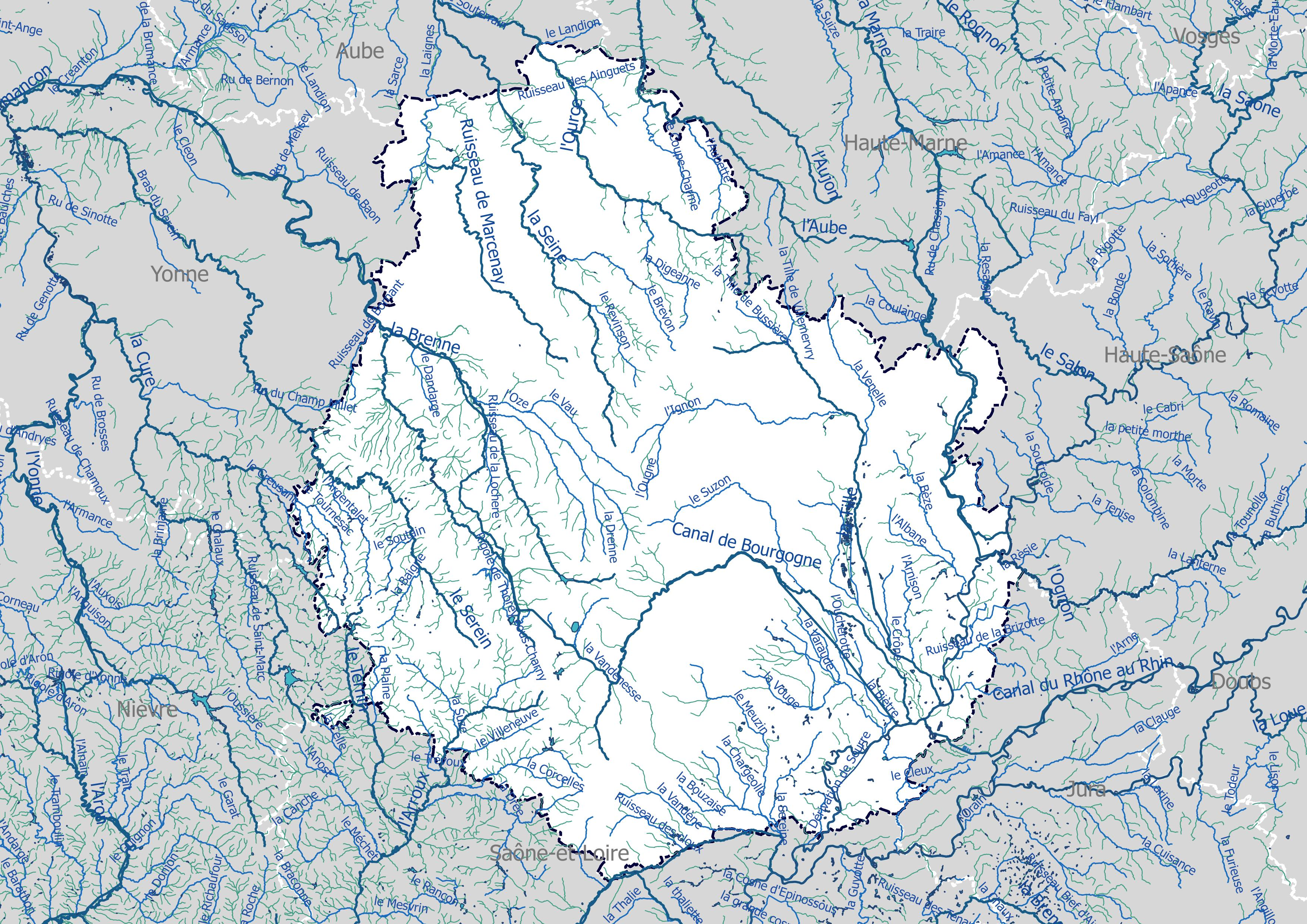 Réseau hydrographique du département de la Côte-d'Or (France).